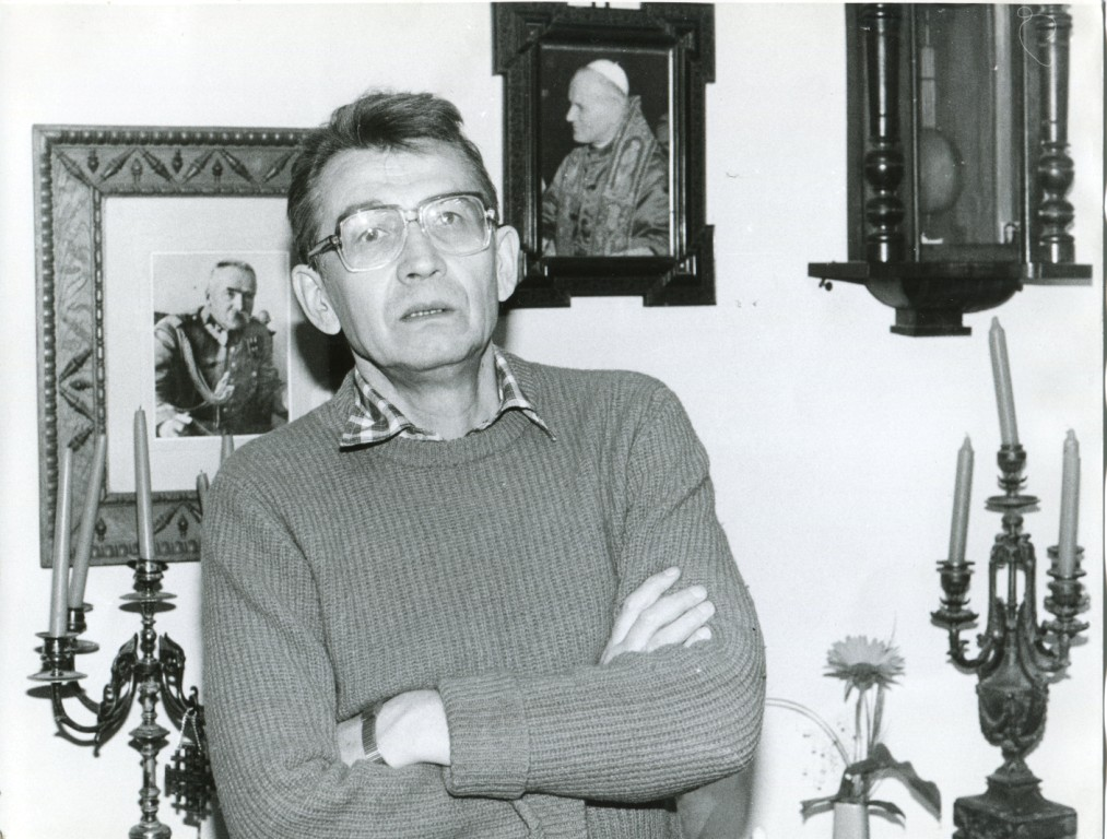 Leszek Moczulski w warszawskim mieszkaniu, w gabinecie. Zdjęcie wykonano po wyborze JP II (16.10.1978) a przed długotrwałym uwięzieniem Moczulskiego we wrześniu 1980 r.